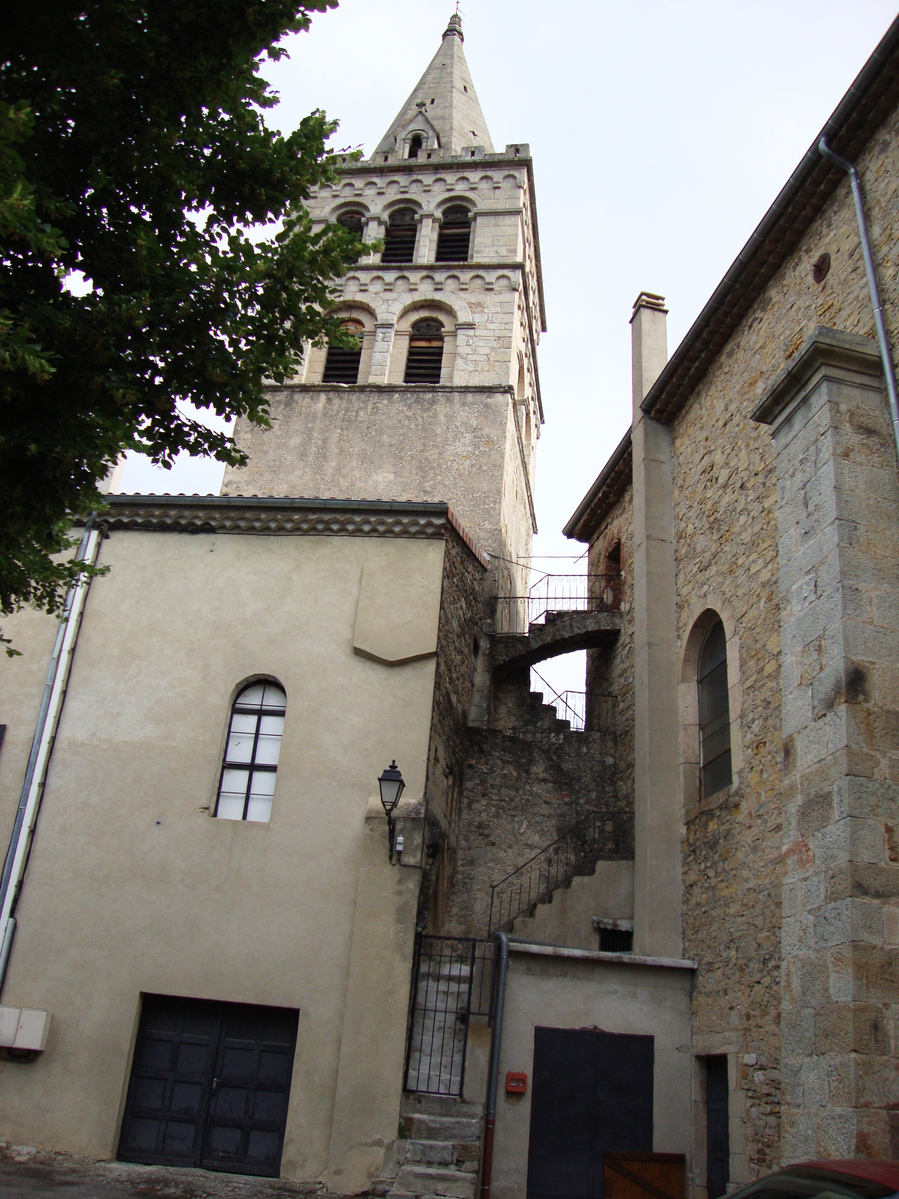 St.Etienne-de-Fontbellon (Ardèche, Fr) église, tour et escalier extérieur